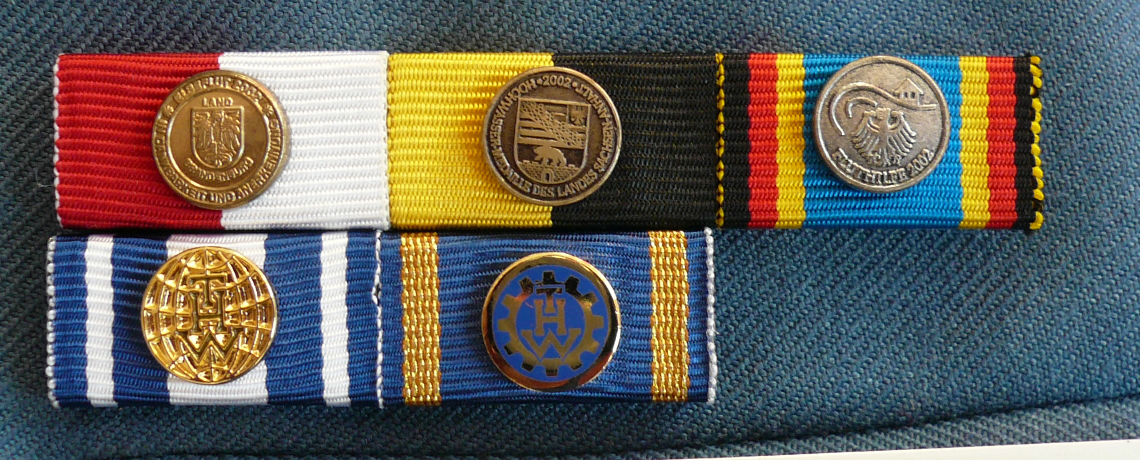 Bandschnalle an THW Uniform (Elbeflutmedalie, Hochwasser-Medaille des Landes Sachsen-Anhalt 2002, Einsatzmedaille_Fluthilfe des BMI, THW Auslandsauszeichung, THW Helferzeichen in Gold